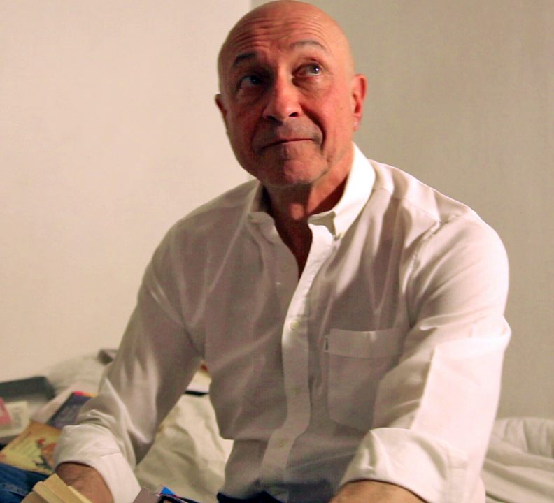 Numa Sadoul sur le tournage du court-métrage Nuit de veille